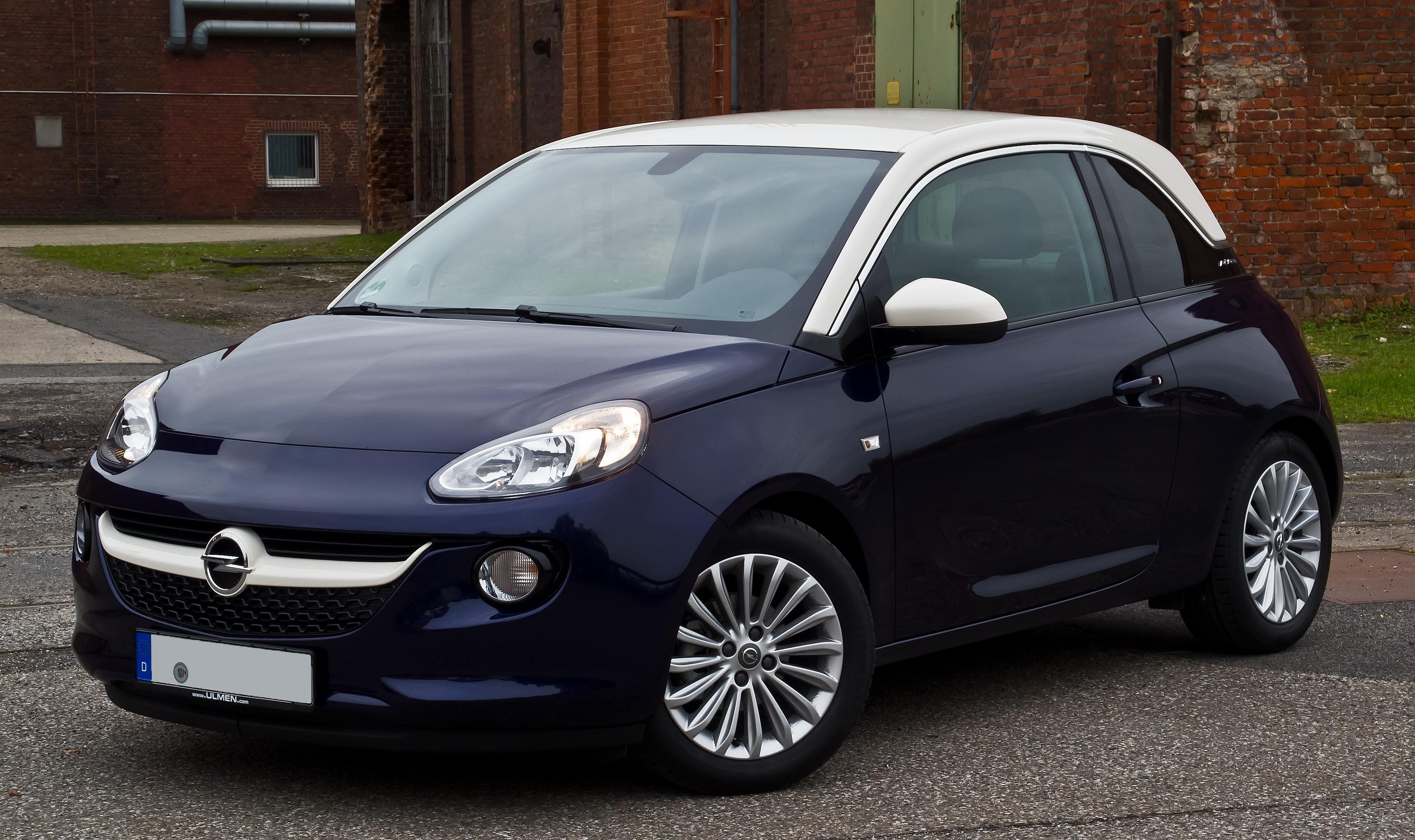 Opel Adam 1.2 Jam